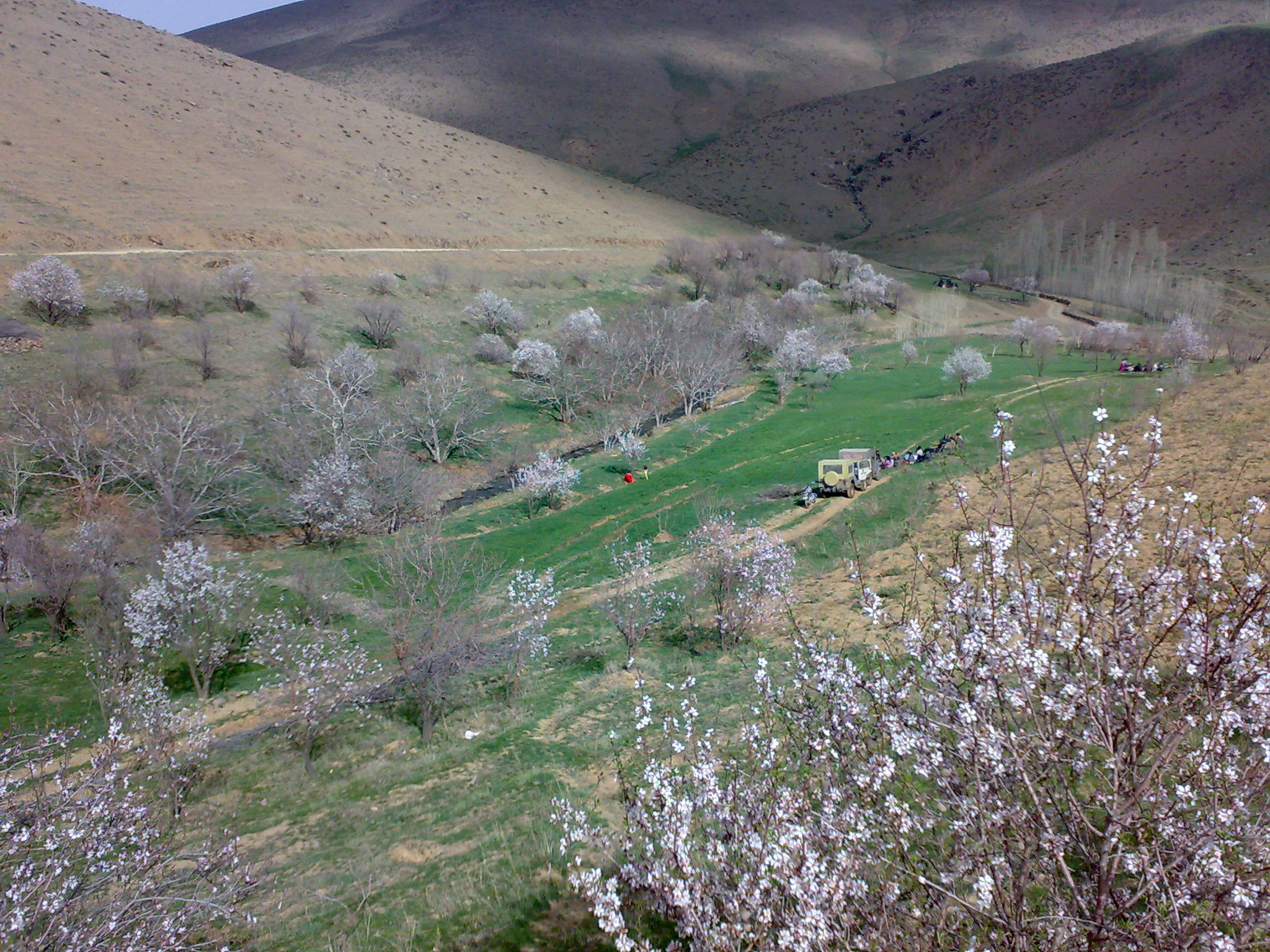 باغ گردو و بادام مام سمایل - روستای باراوا (بهرام آباد)